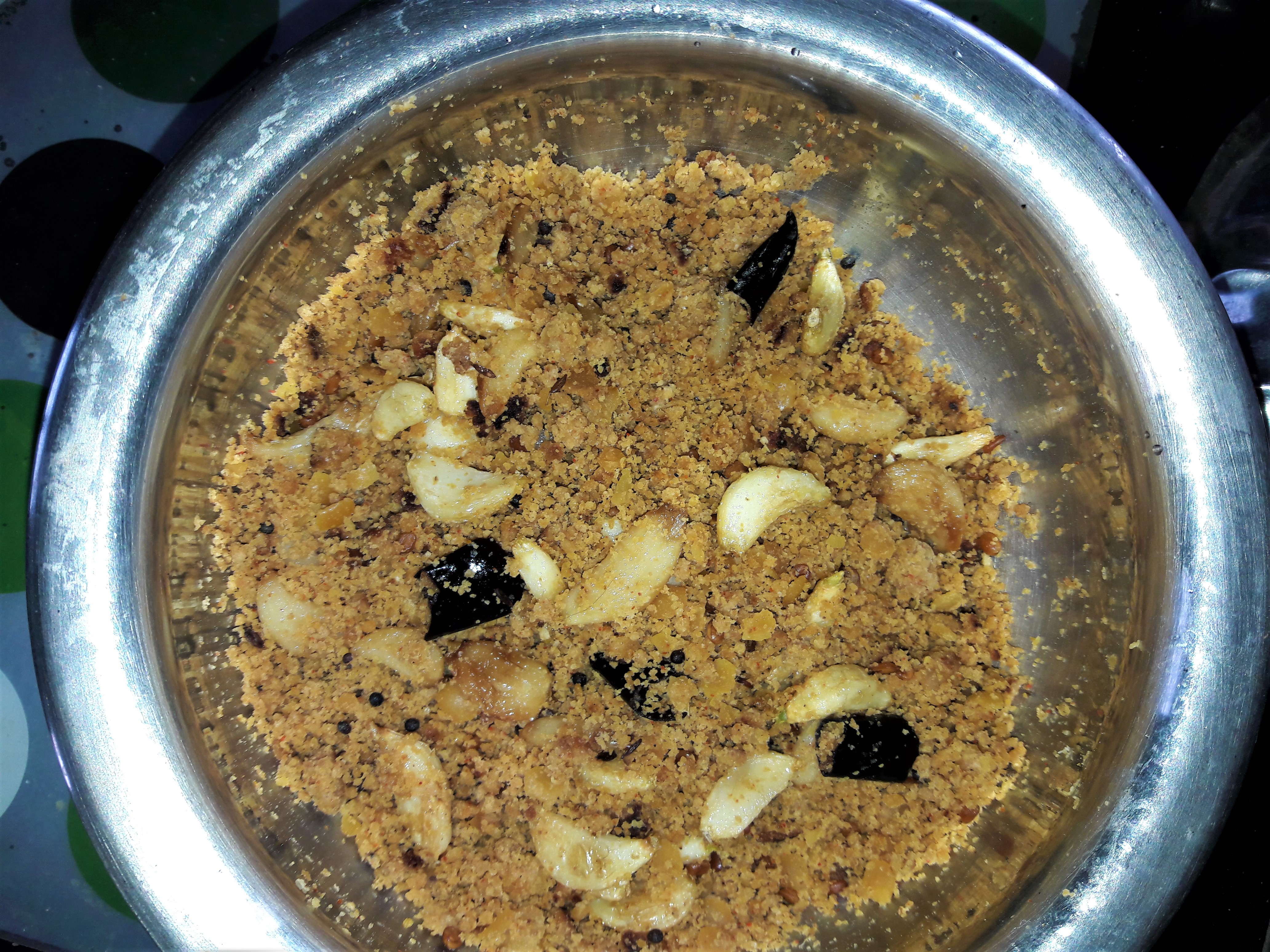 తెలగపిండి కూర